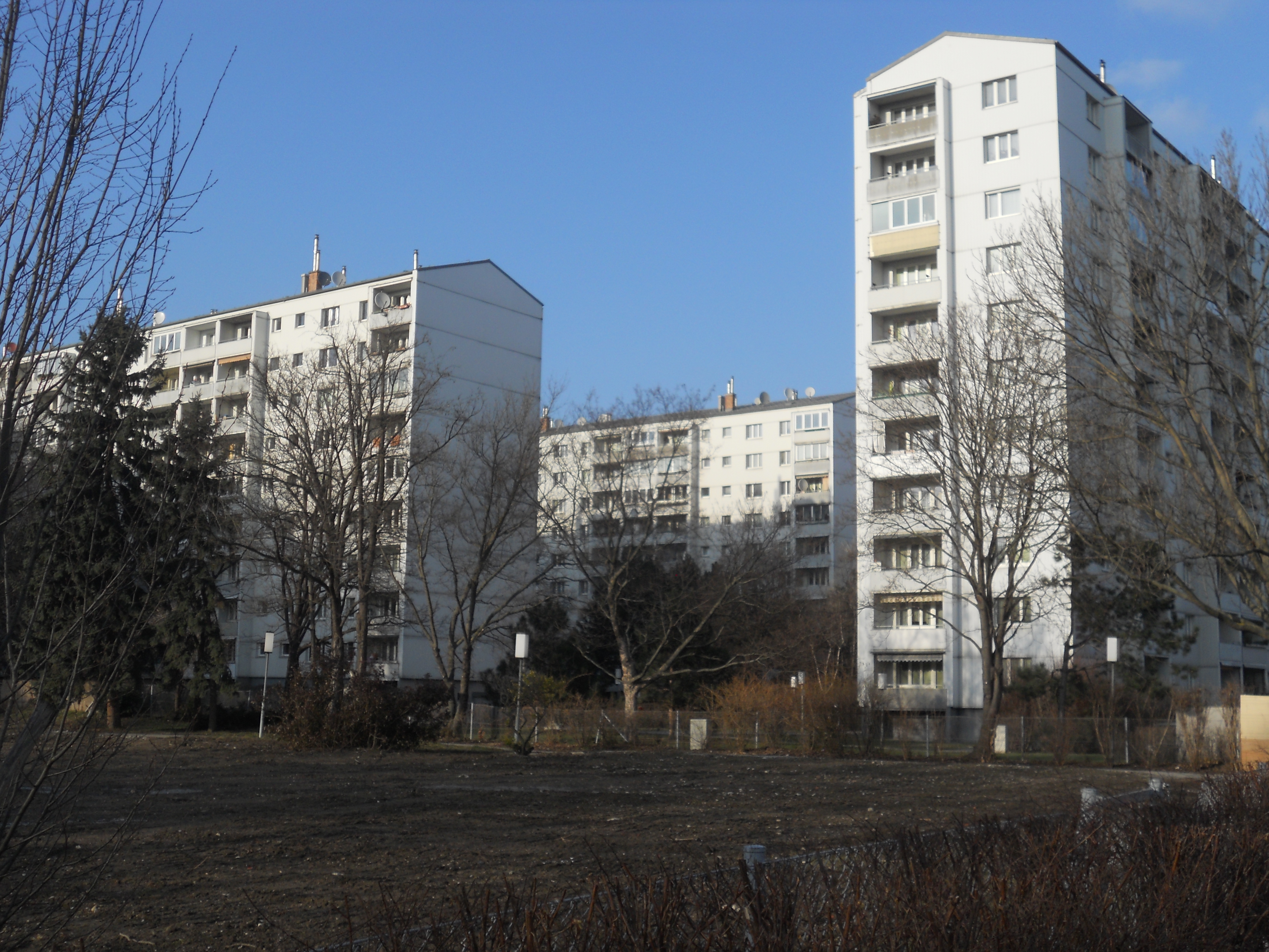 Wohnhausanlage Brigittenauer Lände 170-176 / Spielmanngasse 5 in Wien-Brigittenau